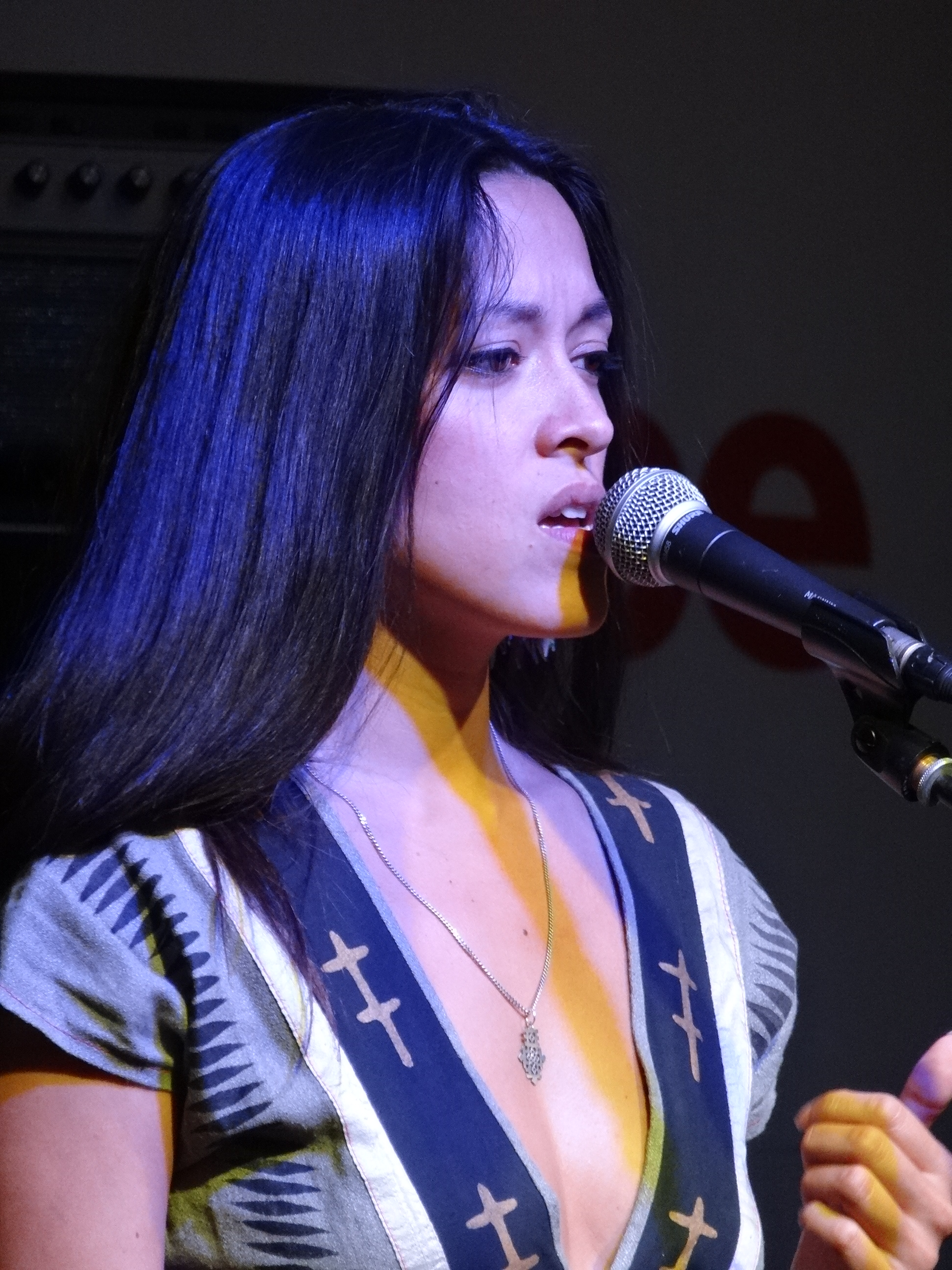 Rock en Seine 2012